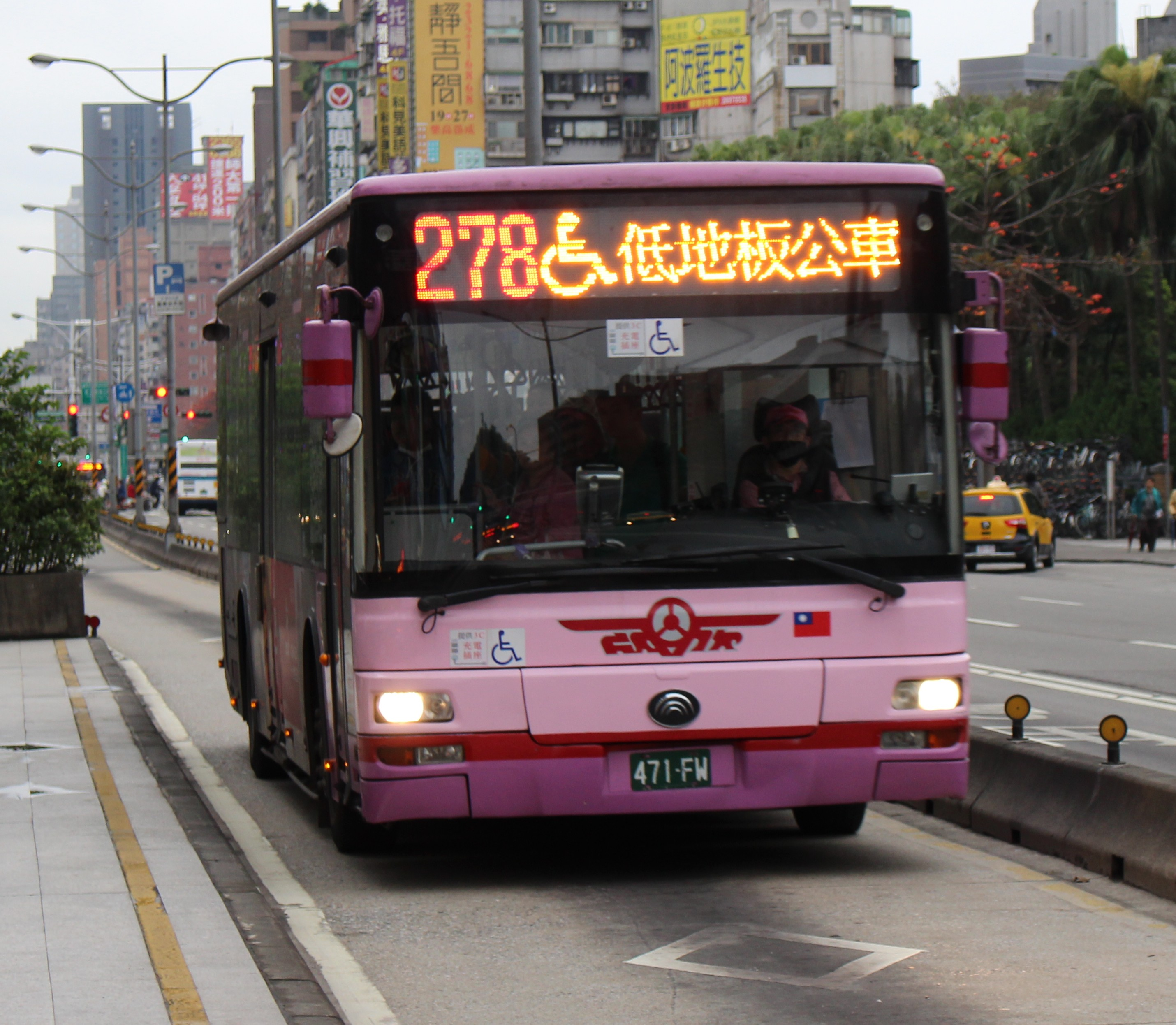 欣欣客運 2012 YUTONG ZK6128HG 471-FW 278